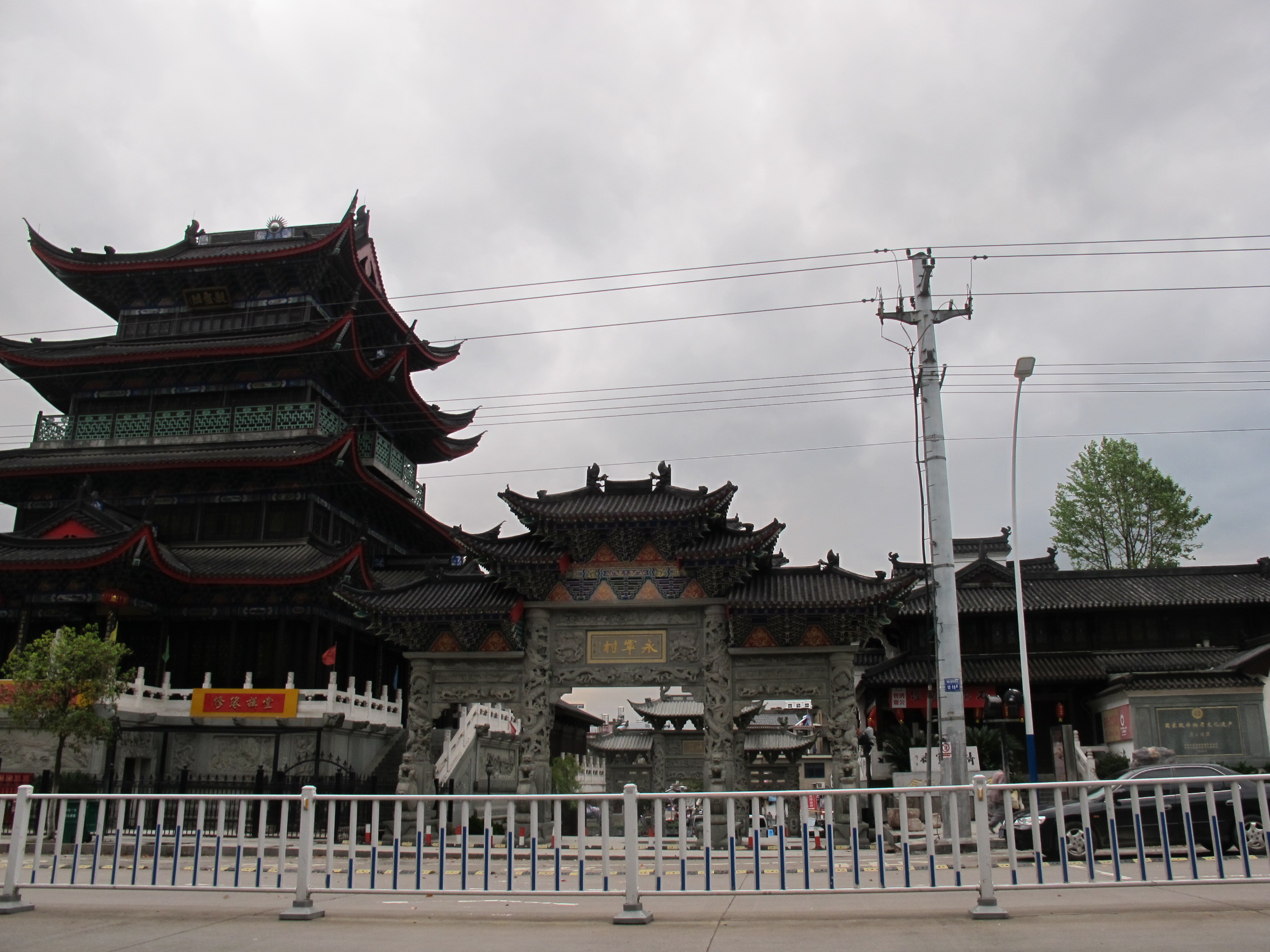 济公故居建筑群